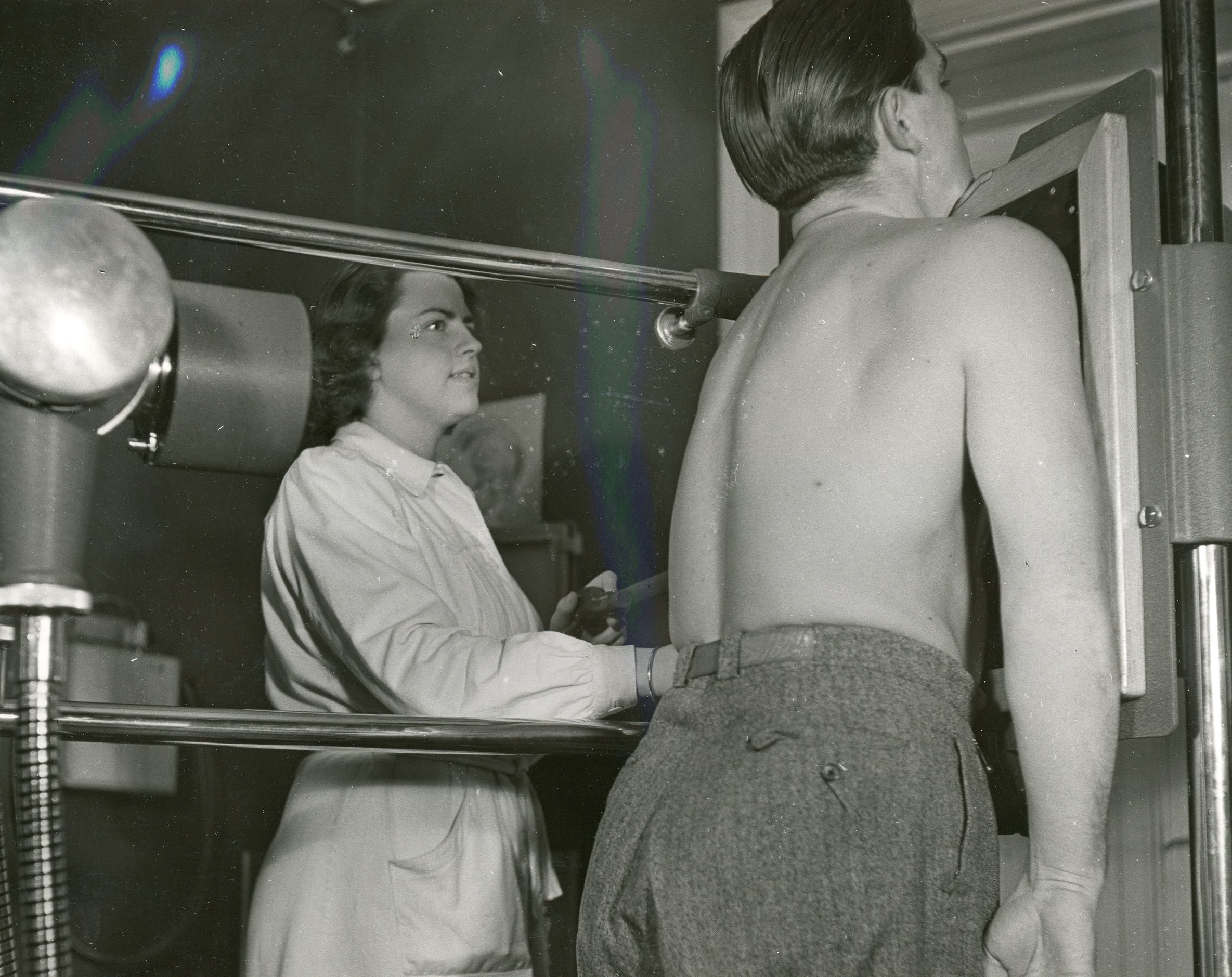 Bildet er hentet fra Arkivverket. Norske flyktninger kommer til Sverige. I en stadig økende strøm har nordmenn siden 1940 tatt seg over grensen fra Norge til Sverige, fra nazistisk forfølgelse og terrortrussel i det okkuperte hjemland. På svensk side blir de først mottatt av svensk militær- og politimyndigheter, hvoretter de sendes til den norske mottagercentralen på Kjesäter slott i syd-Sverige. Her registreres og legeundersøkes alle norske flyktninger før de reiser videre, noen til de norske politiforlegninger, andre til skoler eller sivilt arbeide, kvinneforlegninger, familieforlegninger etc. Bildet viser røntgenfotografering ved legekontoret på Kjesäter. Stocholm 1.2.45. RA/PA-1209/Uc/65/1-2/S 5482 Arkivinstitusjon : Riksarkivet Arkivnavn : NTBs krigsarkiv Sted : Sverige, Ukjent, Ukjent, Emneord: Andre verdenskrig Avbildet